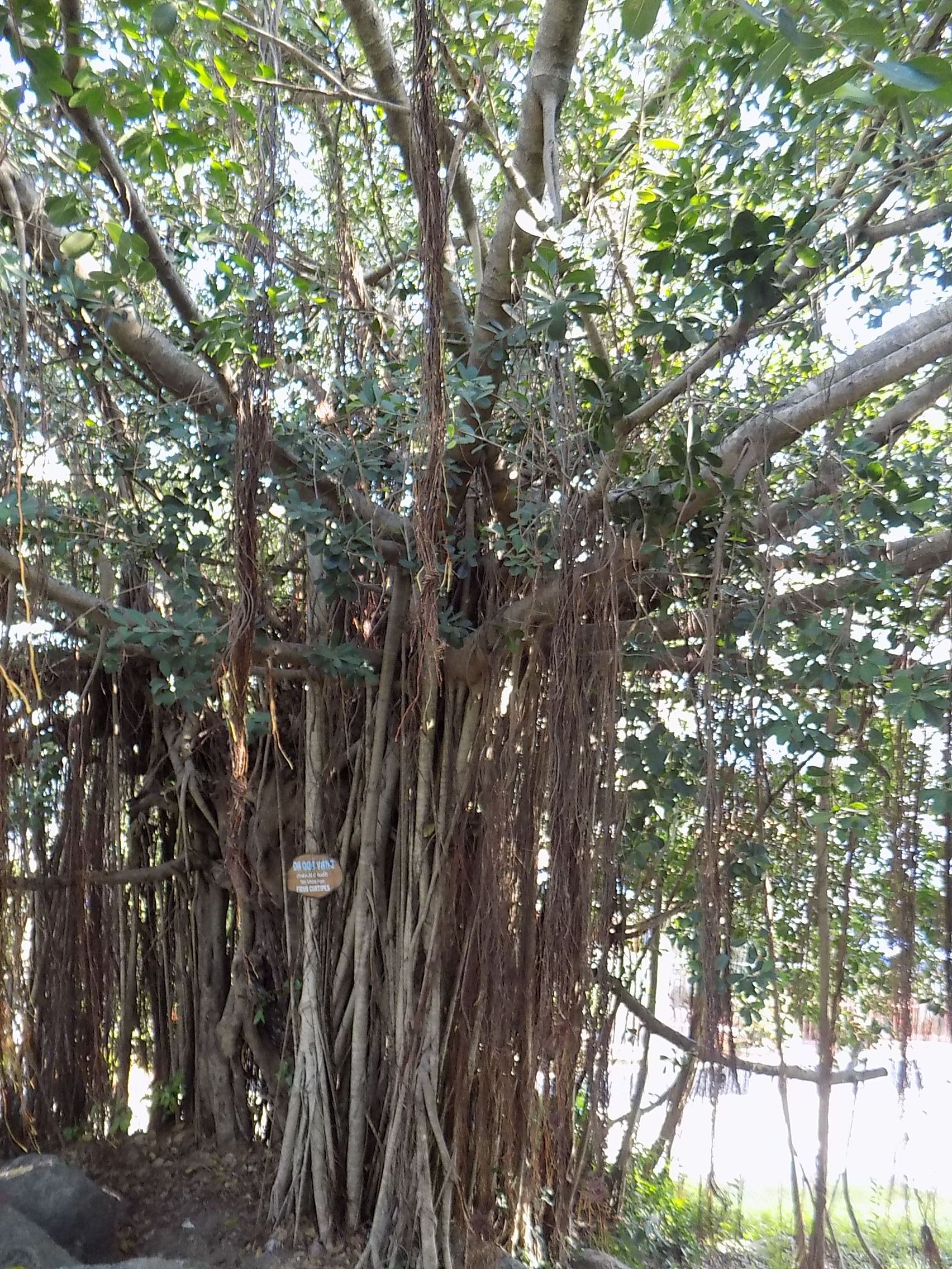 Ficus curtipes à Nha Trang au Vietnam